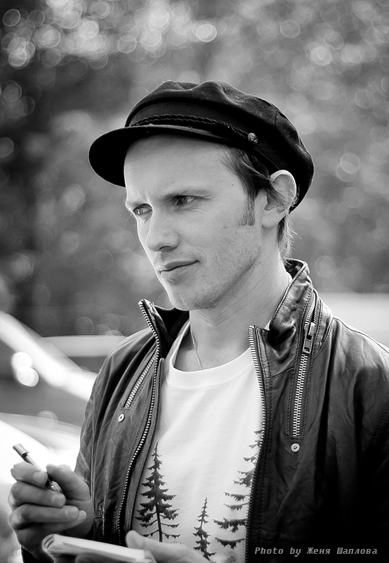 09.06.2012 Парк Горького